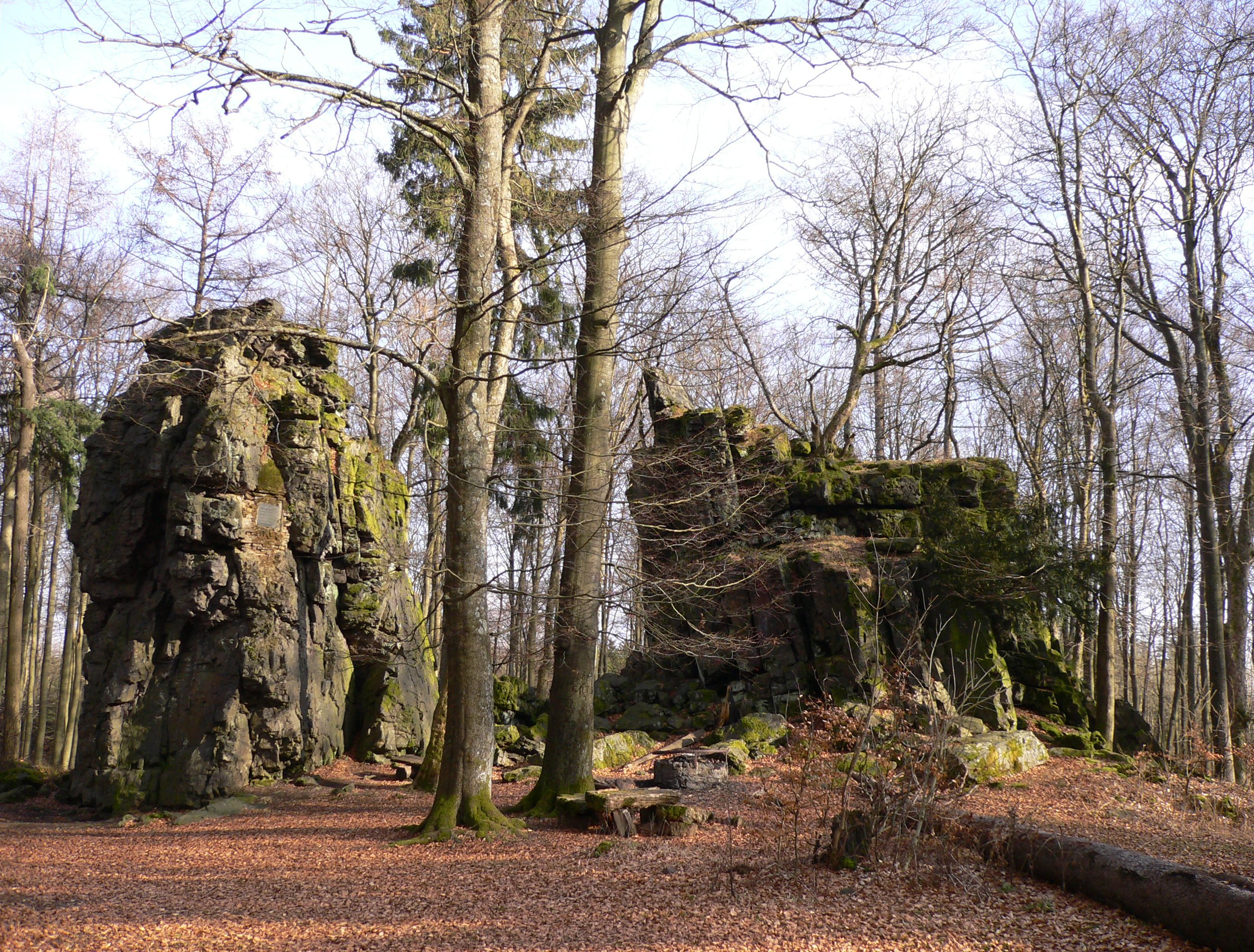 Naturdenkmal Wilhelmsteine im Schelderwald, selbst fotografiert